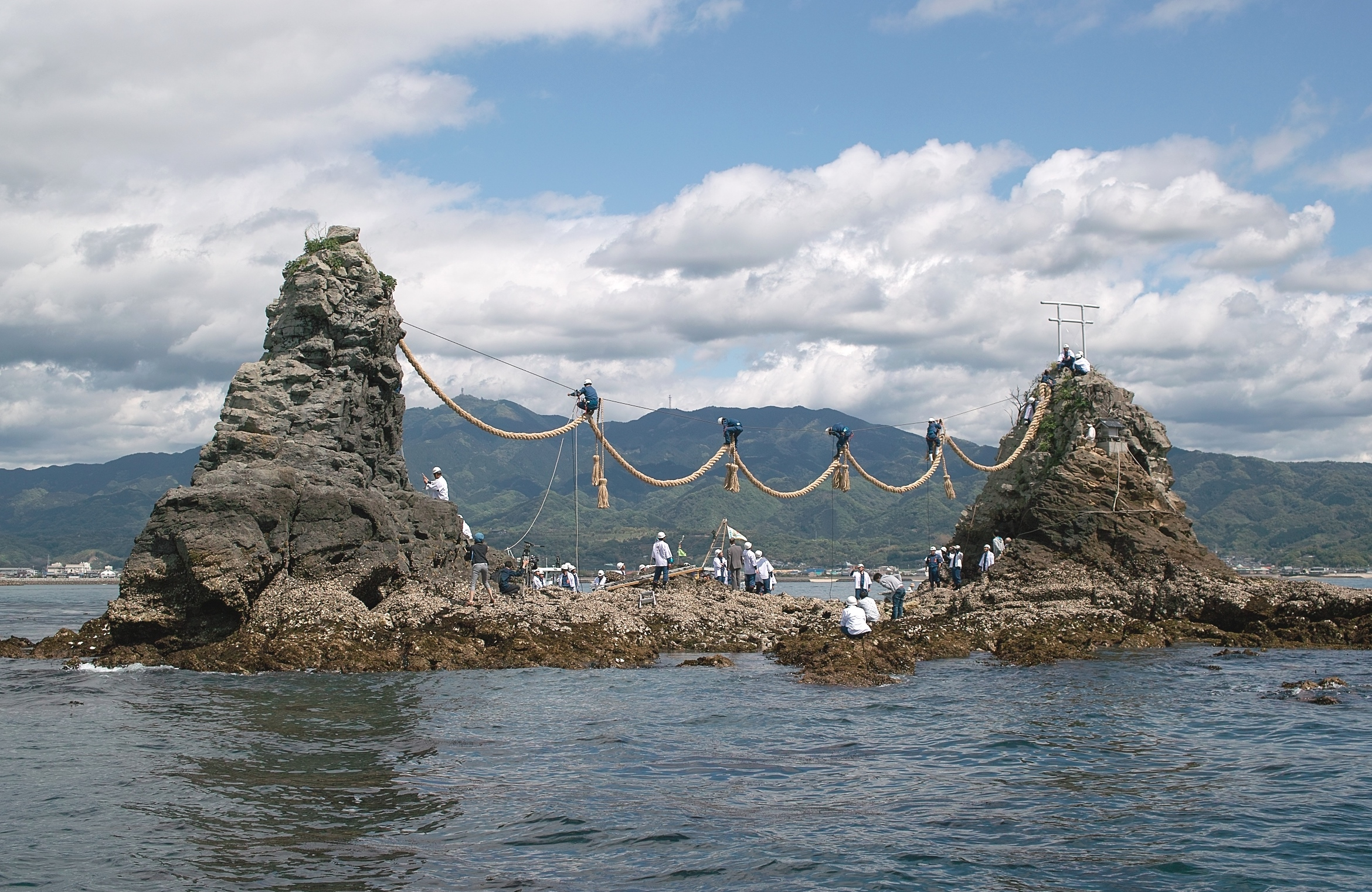 玉里・寒土島